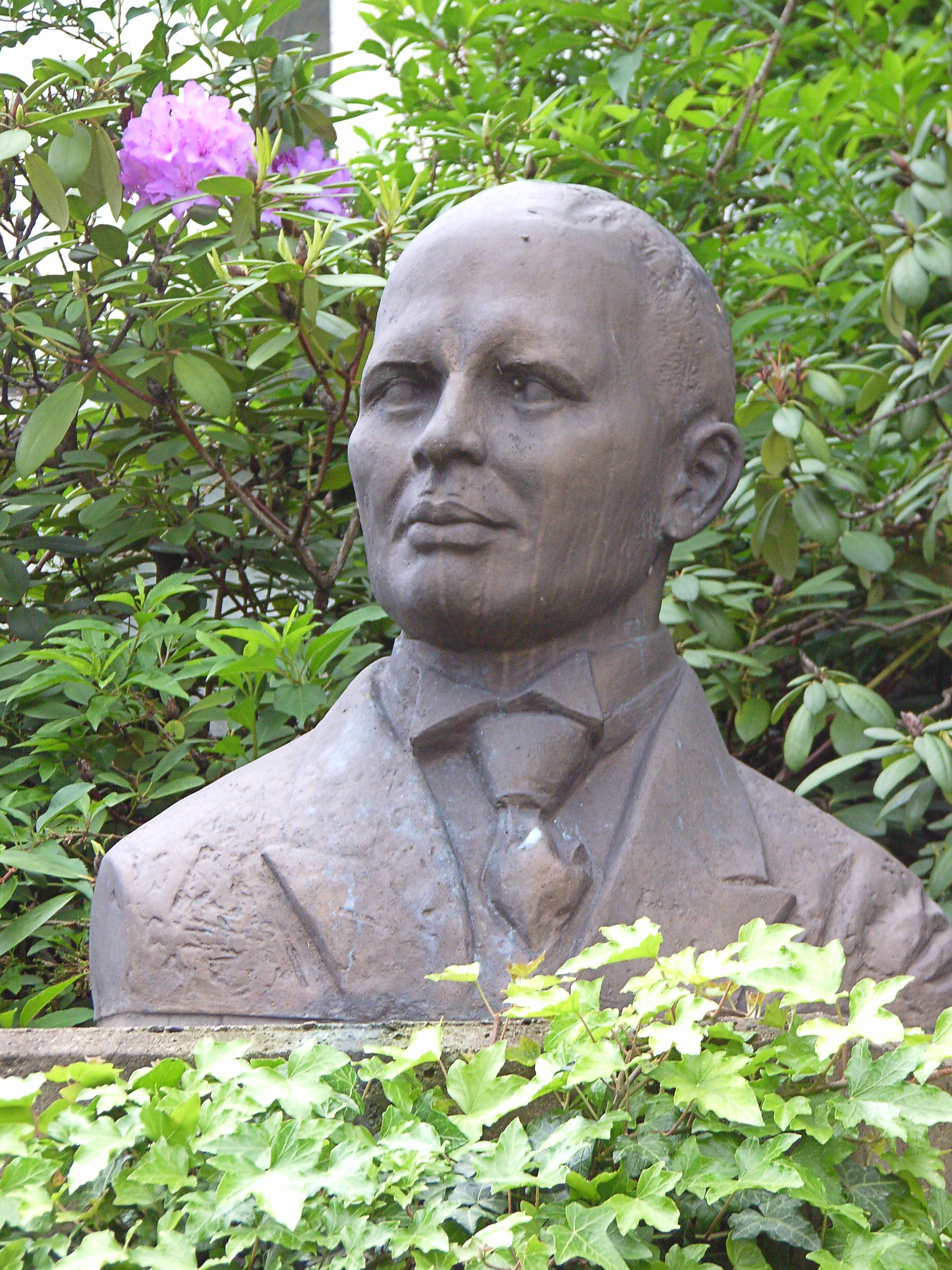 Büste des westfälischen Schriftstellers Wilhelm Heute (1883–1935) in seiner Heimatstadt Schwelm